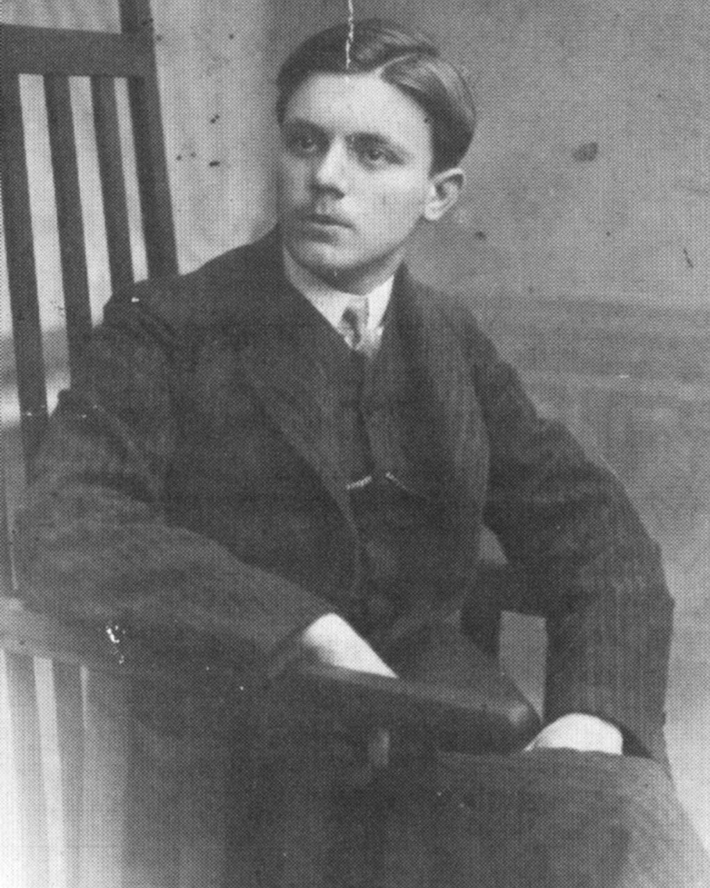 Foto de mozo de Ramón Villar Ponte, escritor galego.